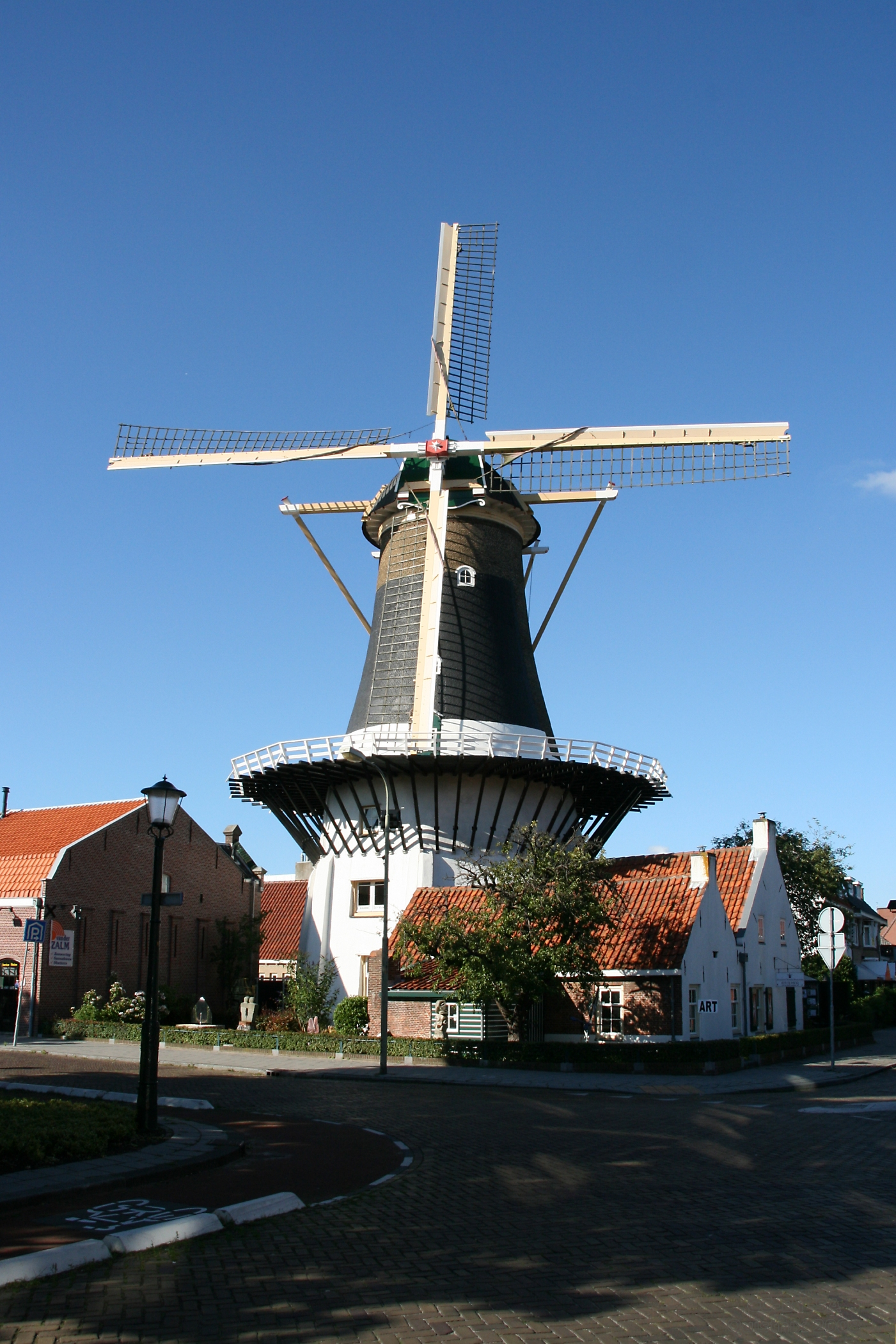 Wassenaar: molen Windlust